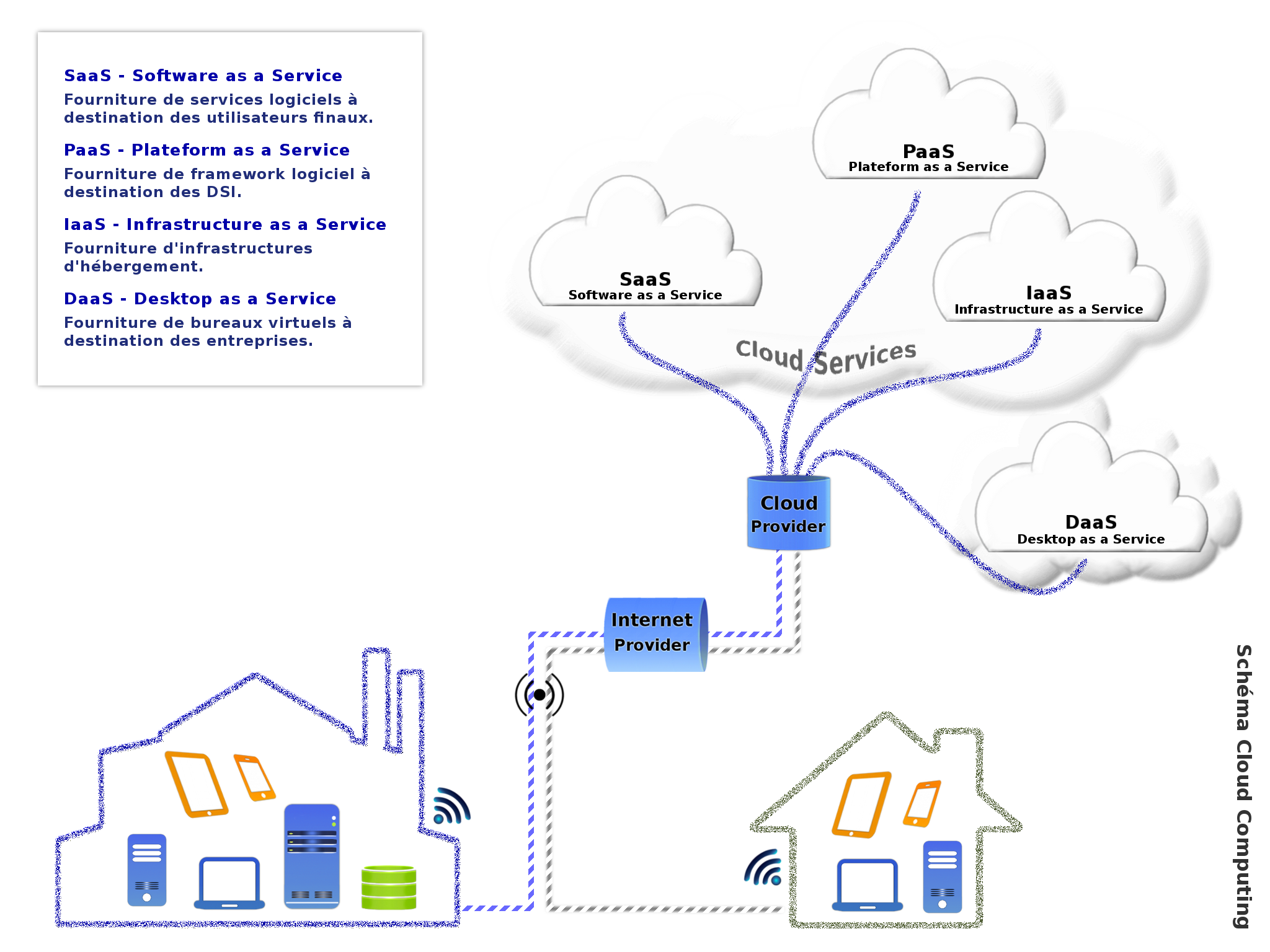 Illustration Schématique du Cloud Computing Image PNG 2048x1536 px Crée avec GIMP